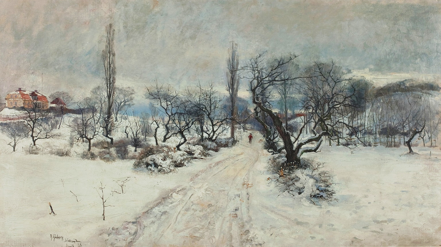 Vinterbild, Zinkensdamm 1888 av Anton Genberg. På tavlan från 1888 syns till vänster en stor gul byggnad med rött tak och längst till höger ett obebyggt berg. I bakgrunden skymtar bebyggelse och lite till vänster mellan träden en väderkvarn. Olja, Mått i mm: 590 x 1070.